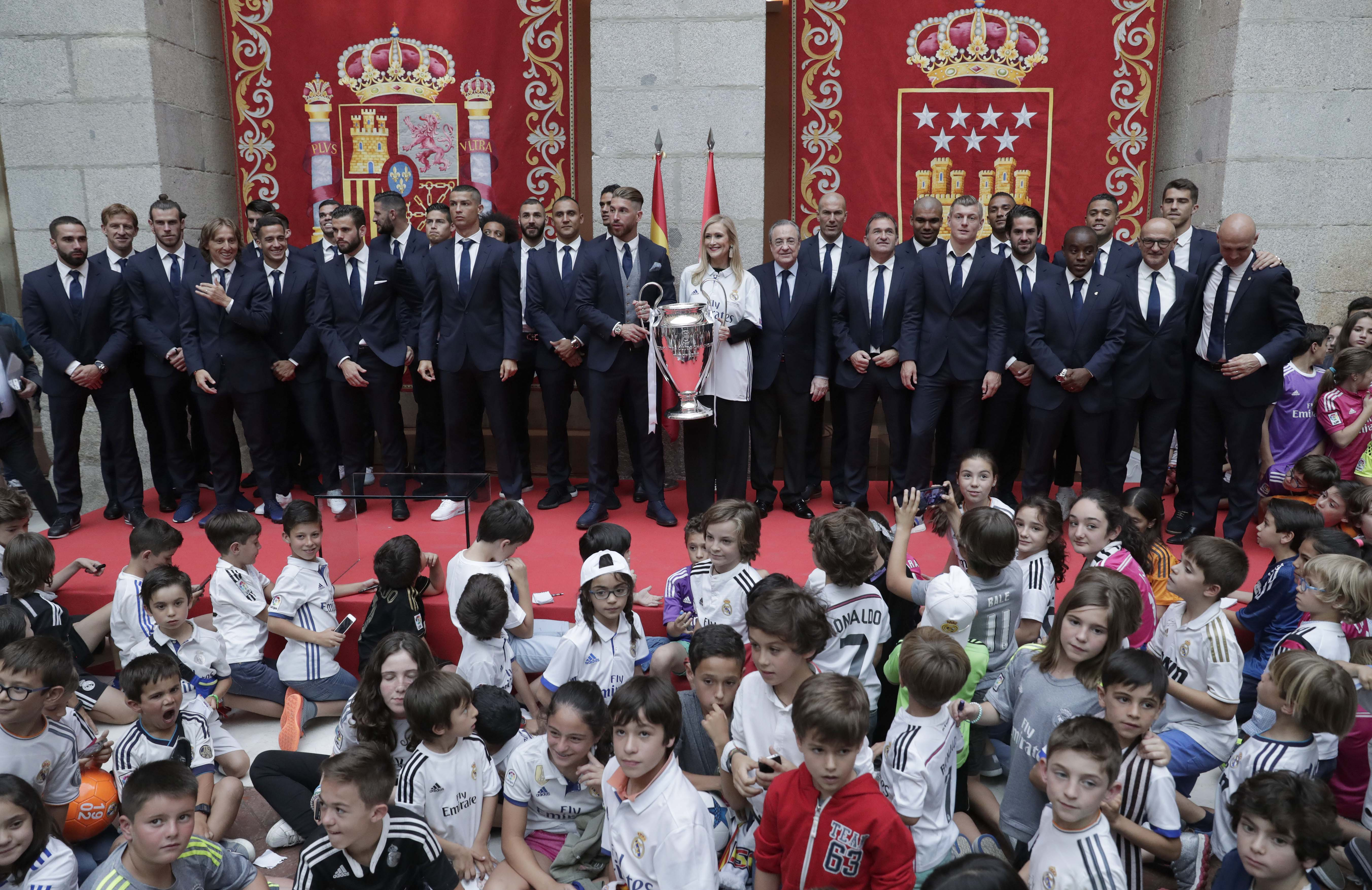 He tenido el gran honor de recibir de nuevo al Real Madrid que ha querido compoartir con todos los madrileños esta copa. Antes de nada guardamos un minuto de silencio en recuerdo de las víctimas del atentado de #Londres y quiero mostrar mi cariño, apoyo y solidaridad a las víctimas y sus familiares. Ya tenemos en la casa de todos los madrileños la réplica de la Champions y la camiseta de los campeones. Esta #Champions convierte la historia de este equipo en una historia inédita de triunfos en el fútbol mundial. En menos de dos años han ganado un Mundial, Supercopa, Liga y dos Champions. Quiero felicitar al real Madrid en nombre de los madrileños y españoles, ya que dejáis el nombre de Madrid y de España muy alto. Para mí es un honor lucir la camiseta del real Madrid que me habéis regalado porque representa tolerancia, compañerismo y la grandeza" Es un día histórico para el fútbol y muy positivo para el nombre de Madrid